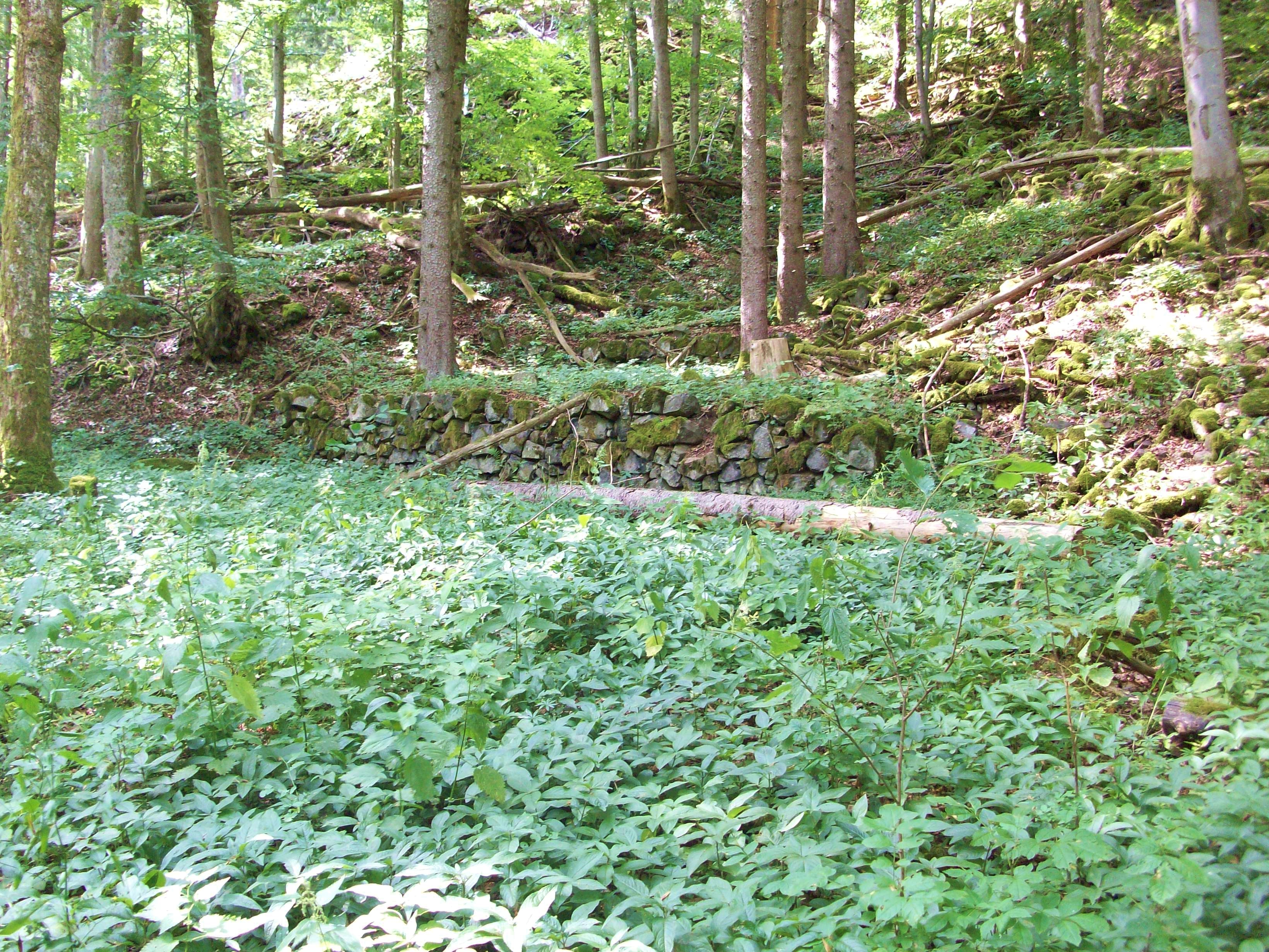 Ehemalige abgesteinte Ackerterassen am Gangolfsberg, vermutlich Teil der Wüstung Wermers